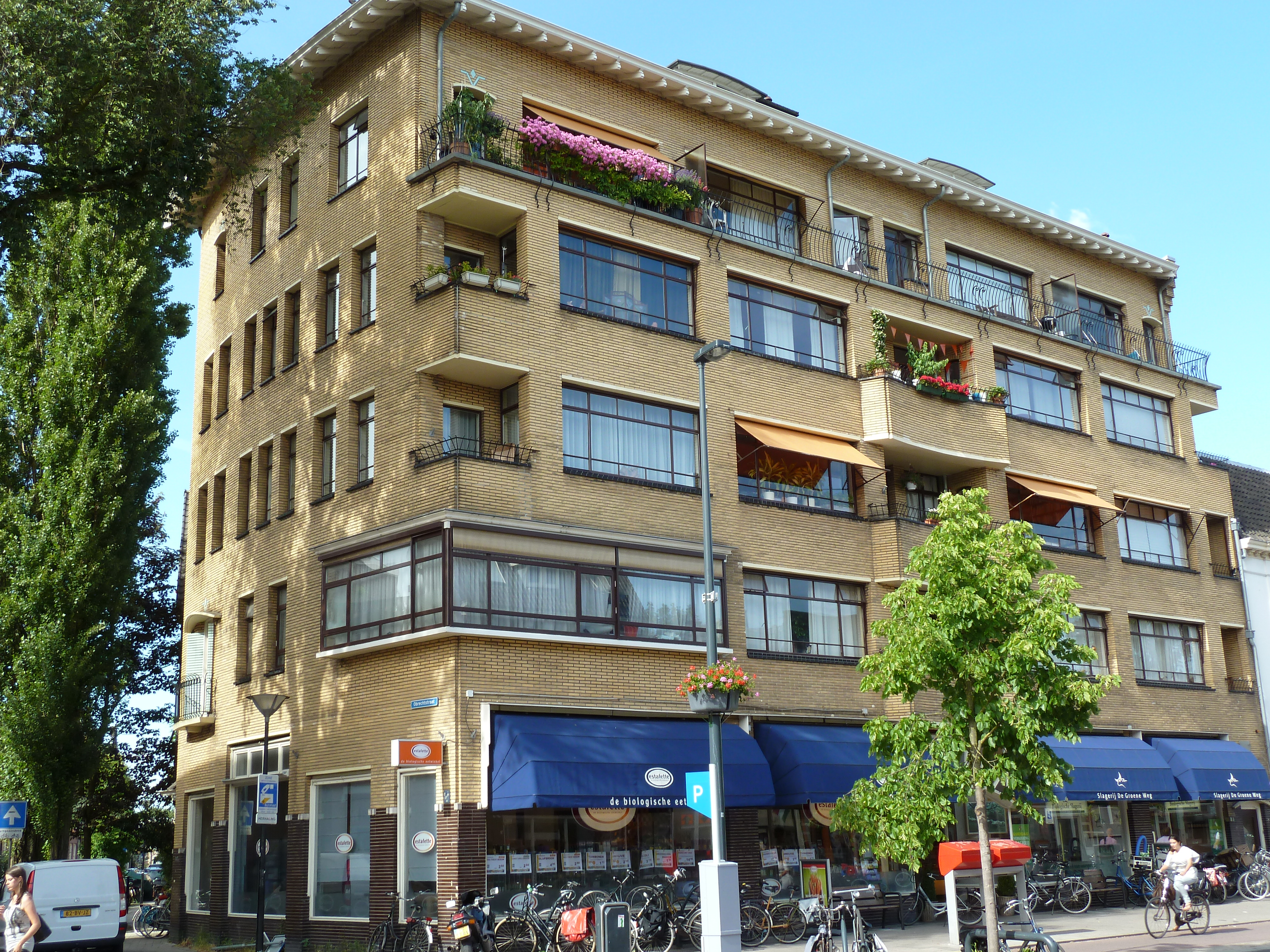 Biltstraat 62-66, Utrecht, NL. Rijksmonument